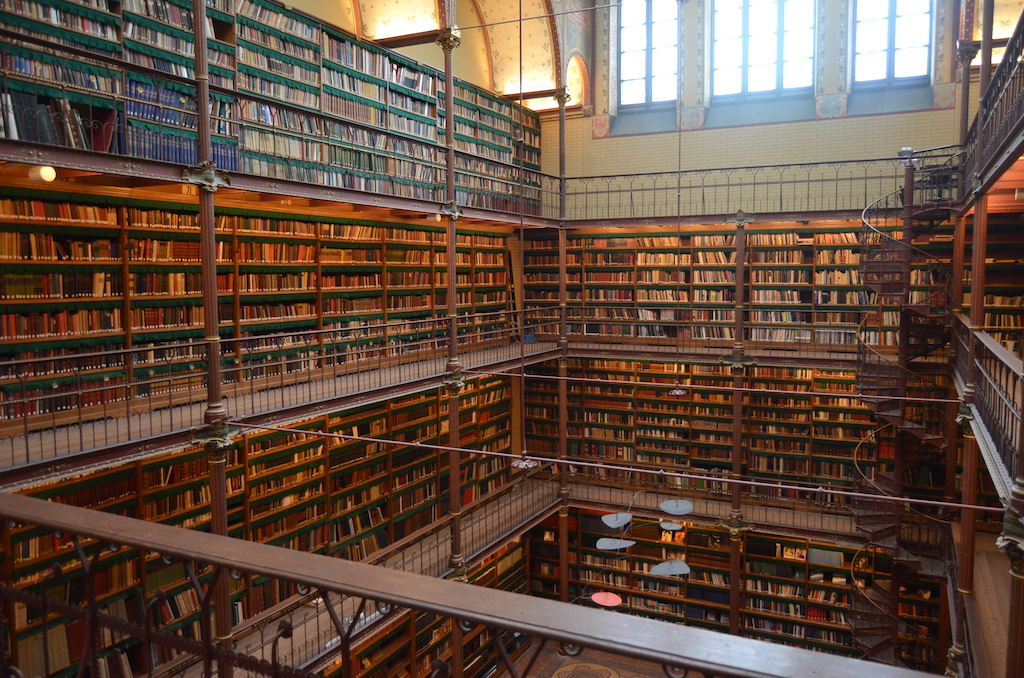 De Bibliotheek van het Rijksmuseum Amsterdam. Foto: Erik Swierstra.